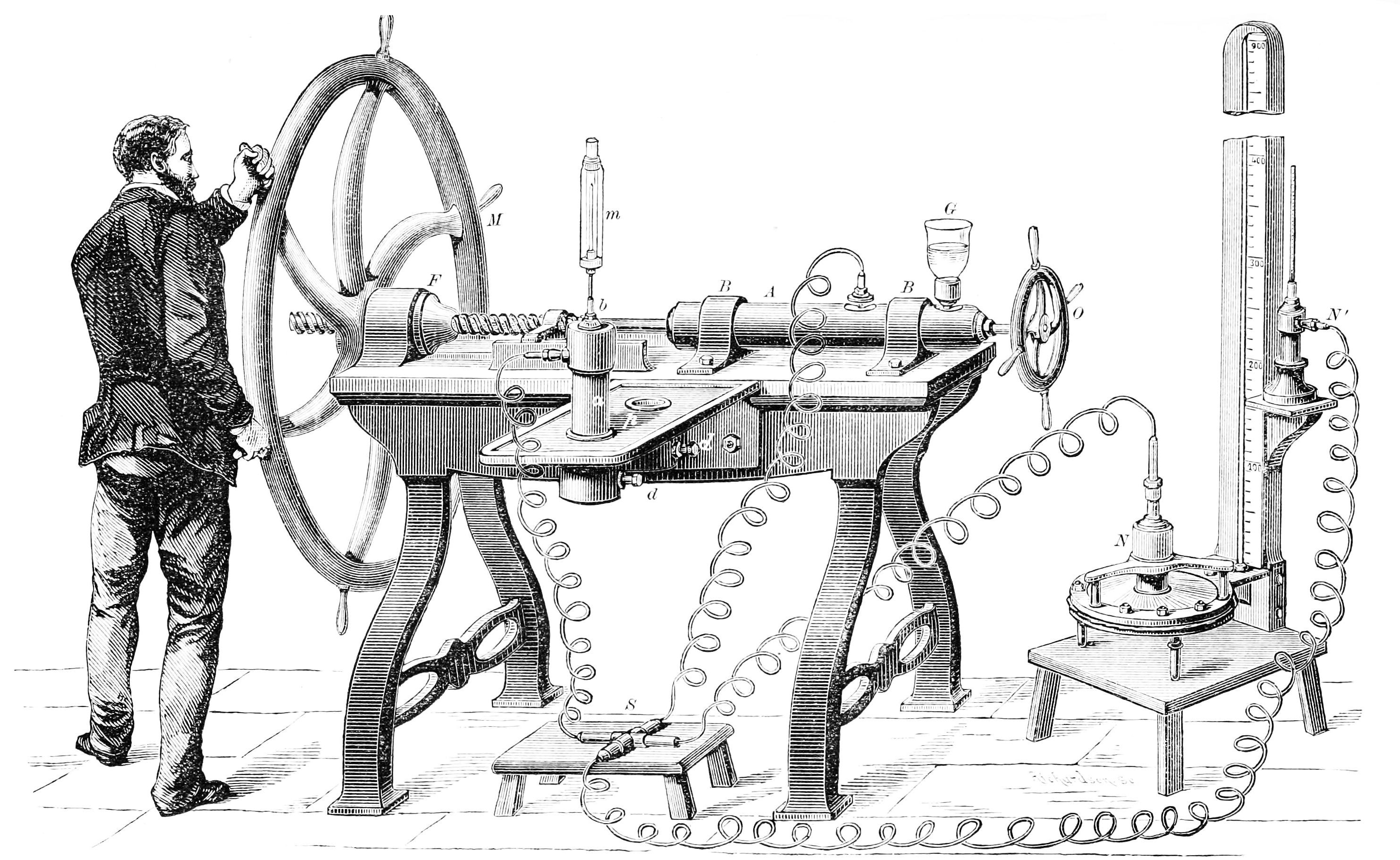 Cailletet gas liquefaction apparatus